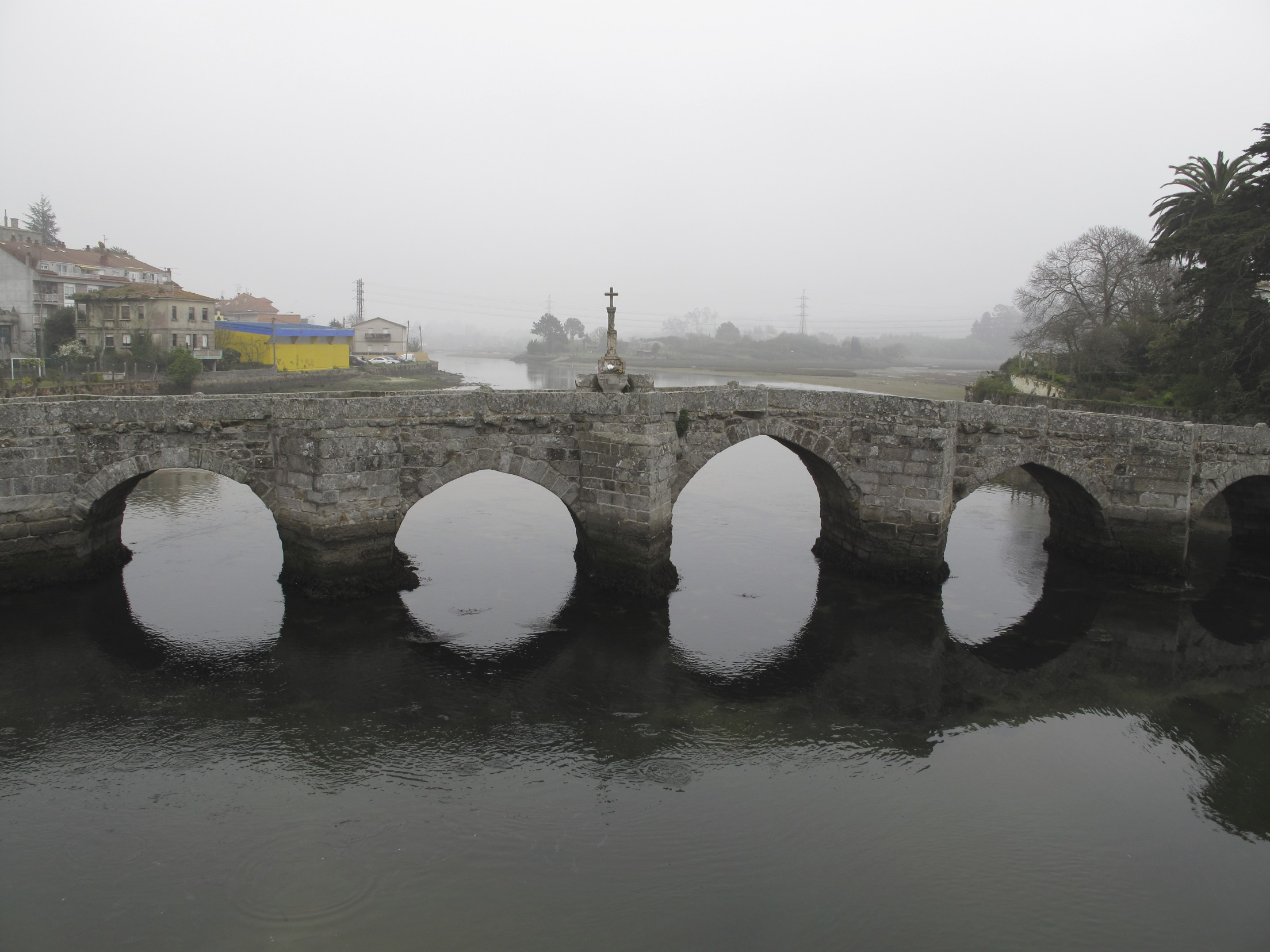 Puente románico de A Ramallosa, entre Nigrán y Baiona, en la provincia de Pontevedra (Spain)